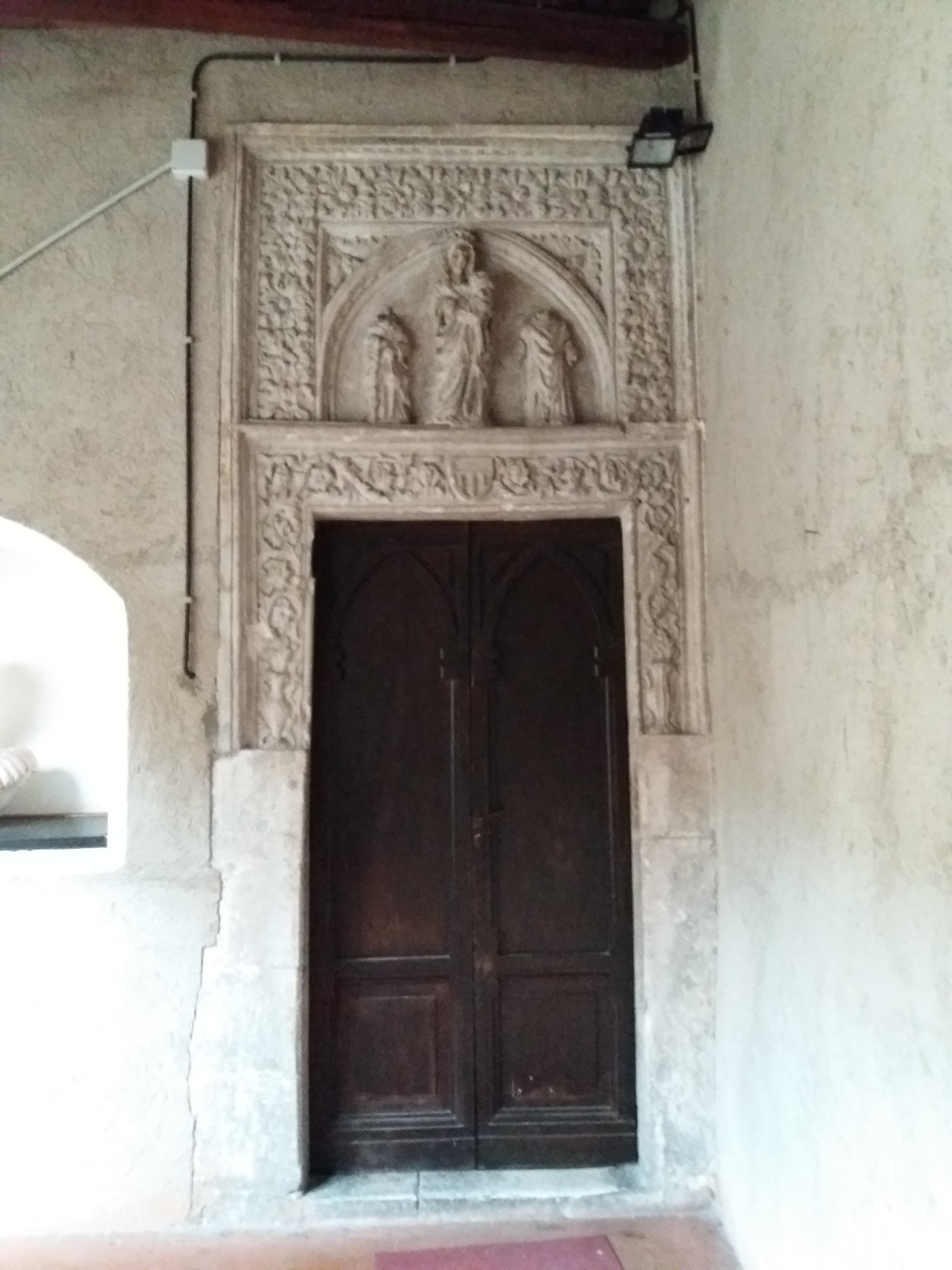 Sulmona: Casa di Giovanni Sardi